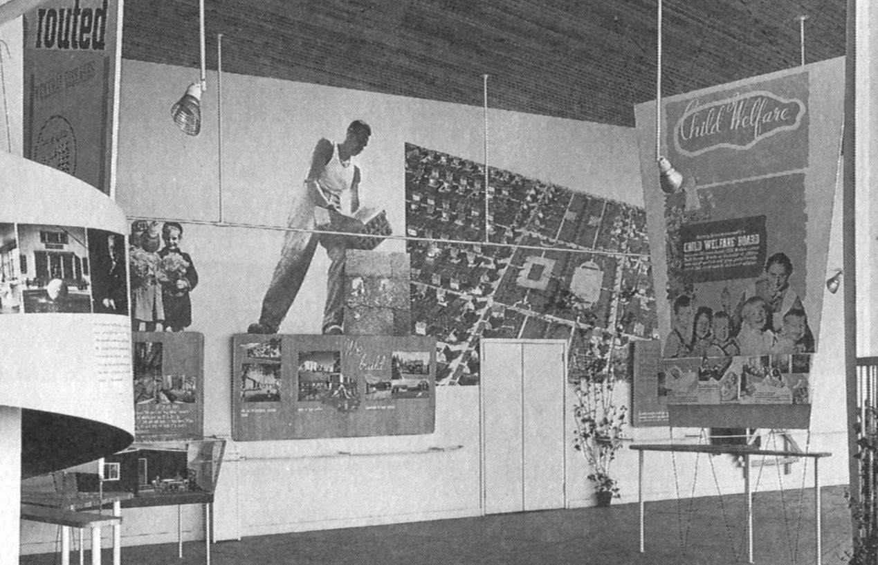 Sveriges paviljong på 1939 New York World's Fair